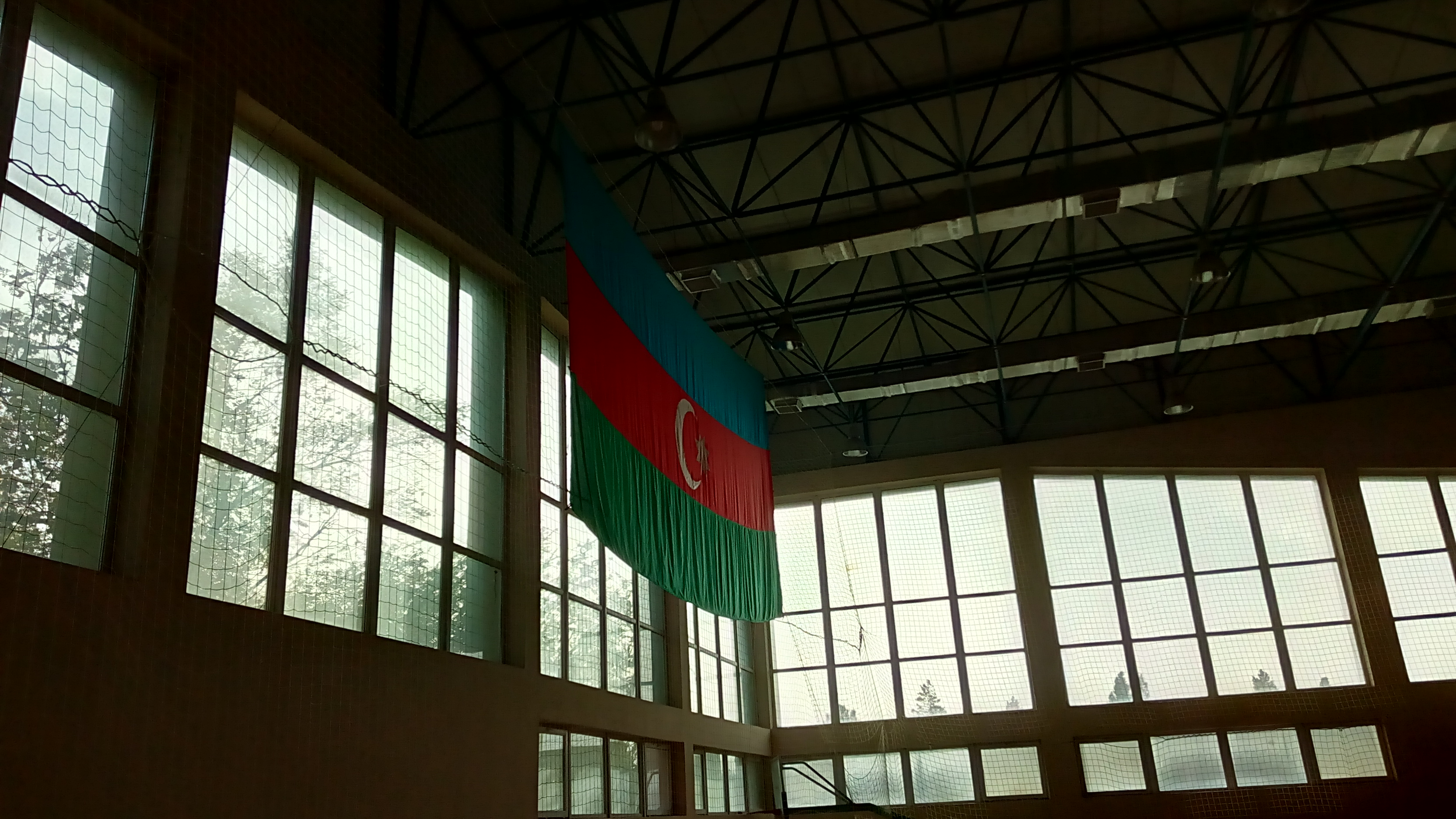 Sumqayıt OİK-də Albert Aqarunovun xatirəsinə həsr olunmuş karate üzrə açıq çempionat